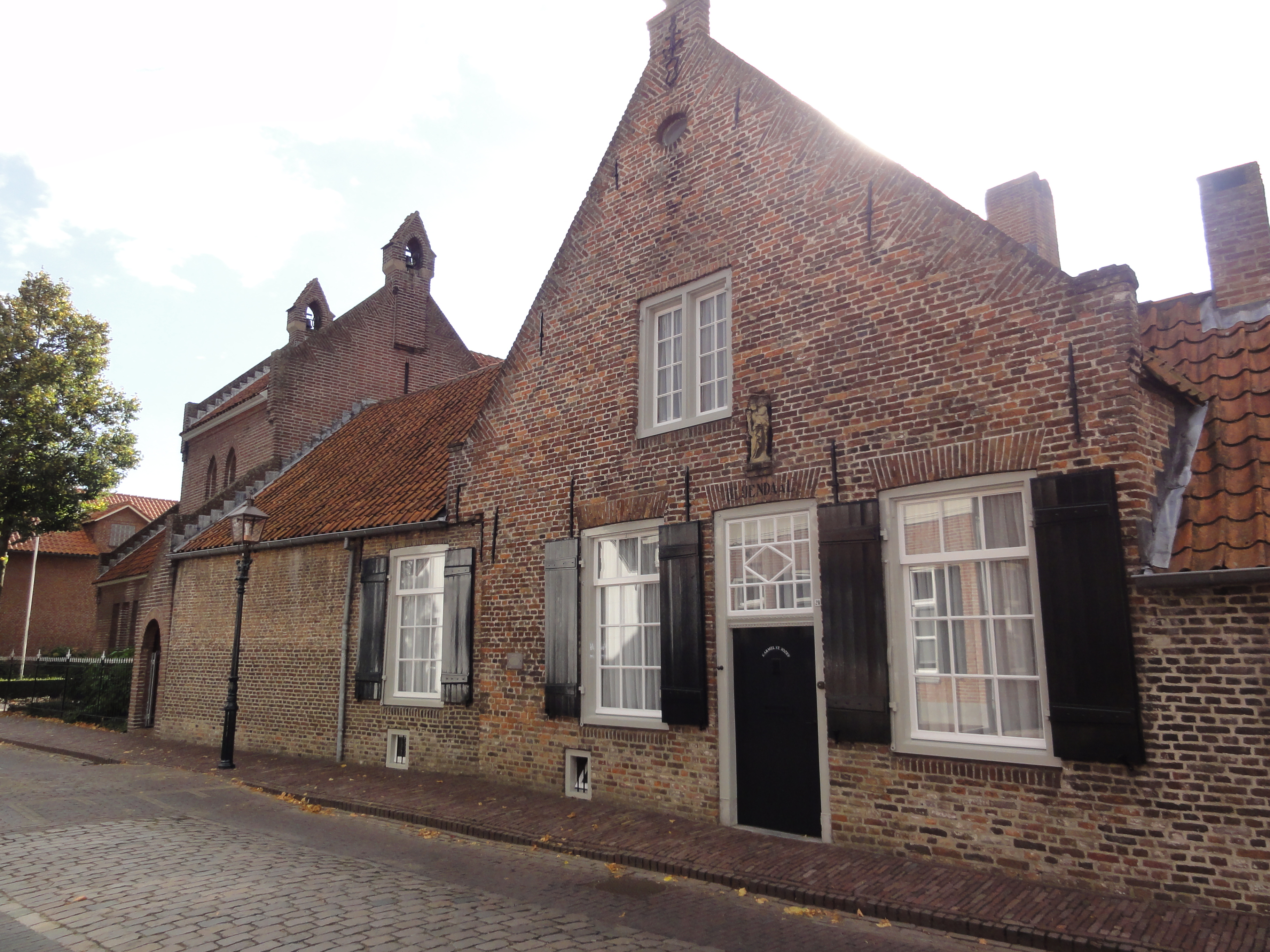 Oirschot Rijksmonument 31309 klooster Nieuwstraat 28 03″ N, 5° 18′ 19.52″ E Object location51° 30′ 16.68″ N, 5° 18′ 18.84″ E